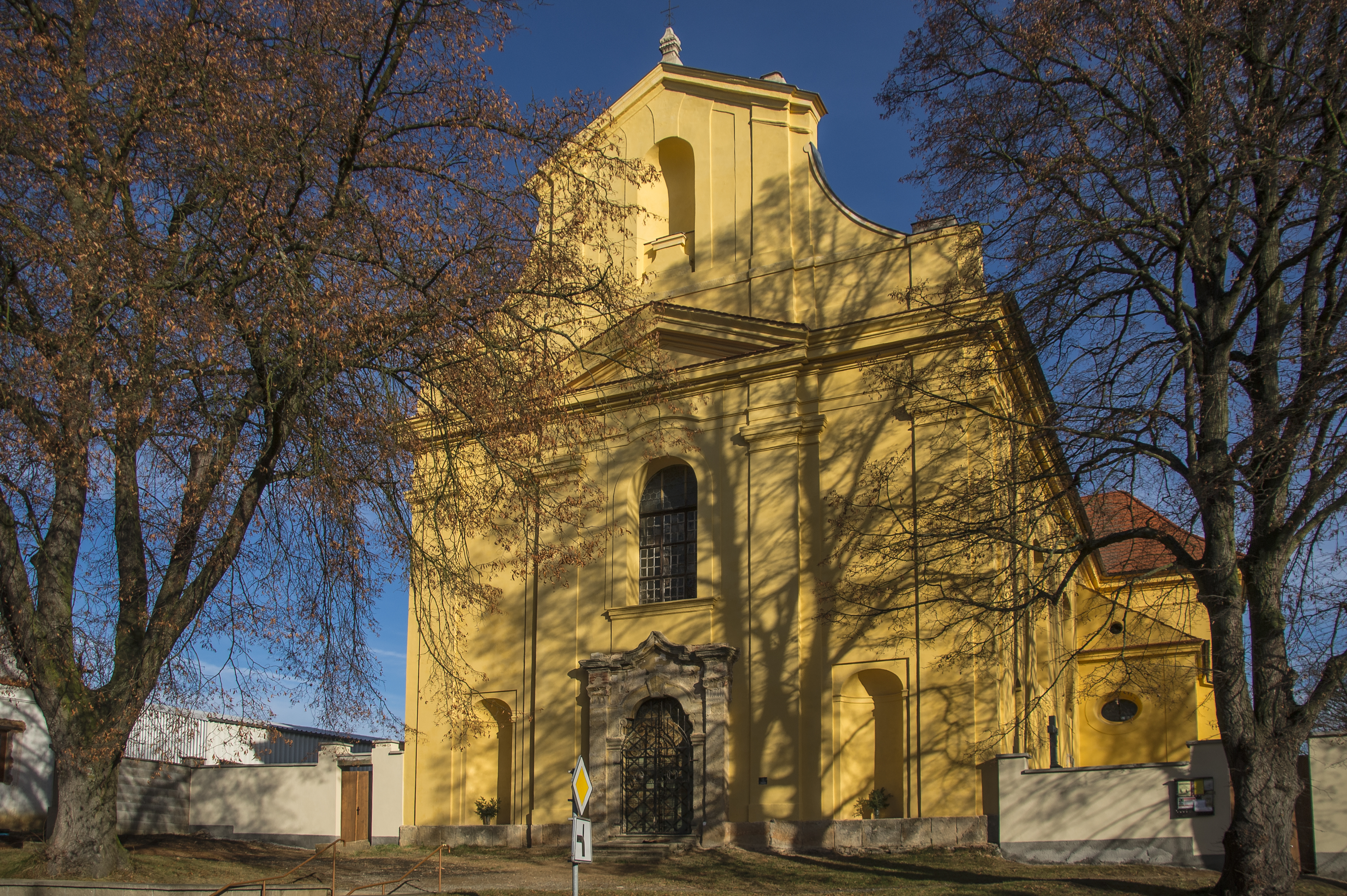 Průčelí kostela v Seči u Blovic